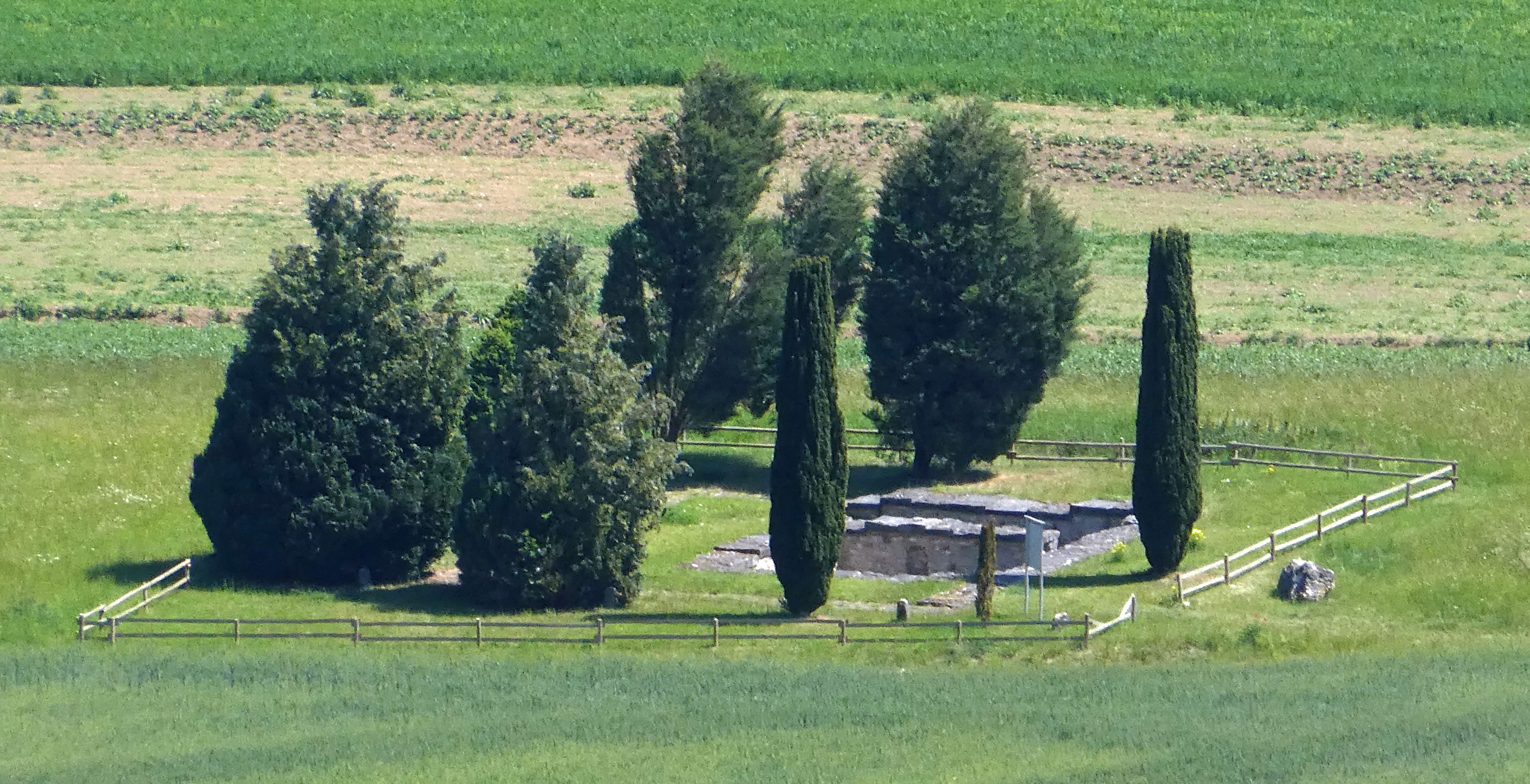 Römerkeller in Oberkochen vom Rodstein aus gesehen